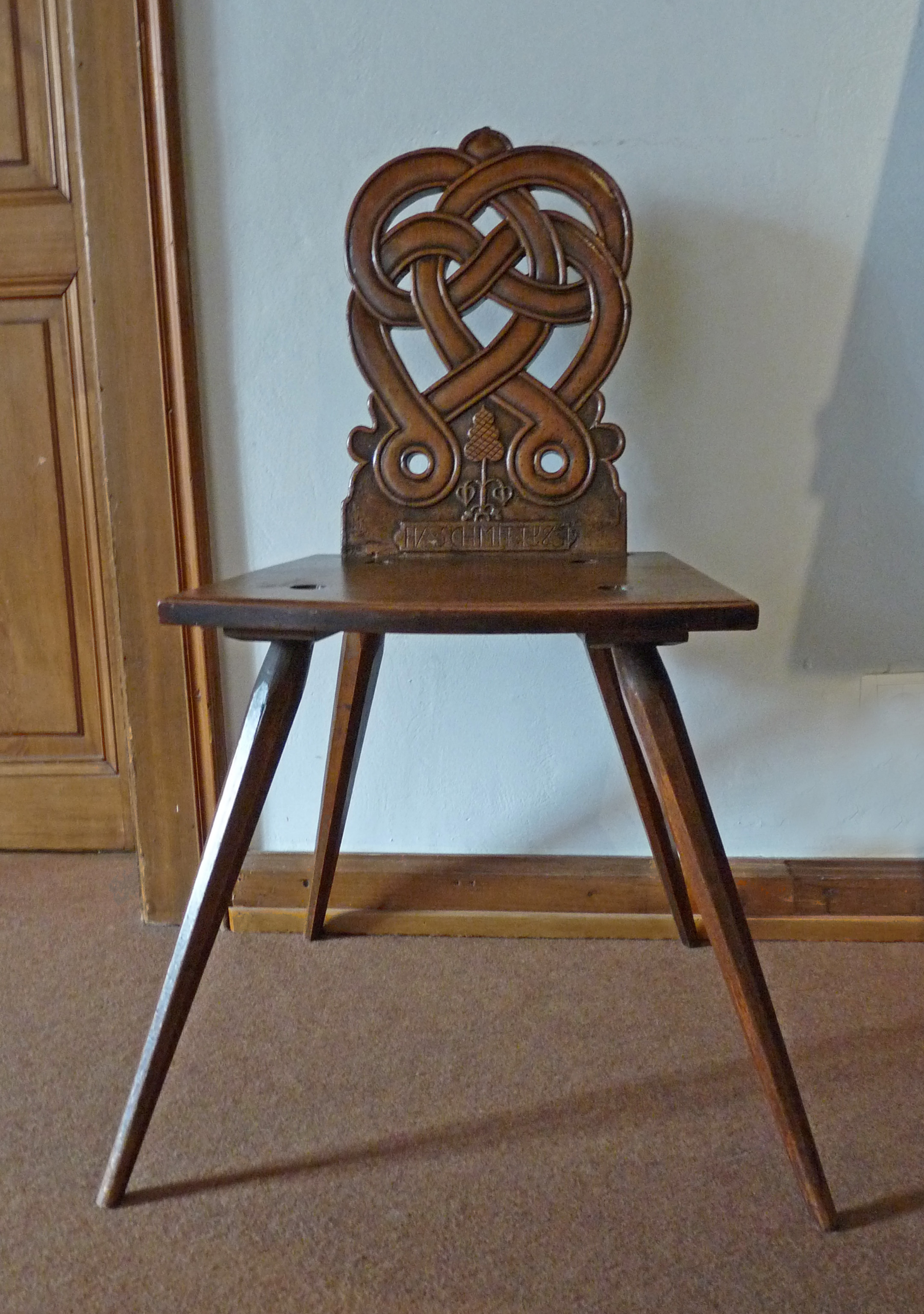 Chaise alsacienne au Musée alsacien de Strasbourg. Elément d'une paire de chaises faites pour un mariage et portant l'inscription HA SCHMITT 1831